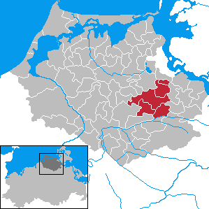 Former Amt Kronskamp in Mecklenburg-Vorpommern - District Nordvorpommern